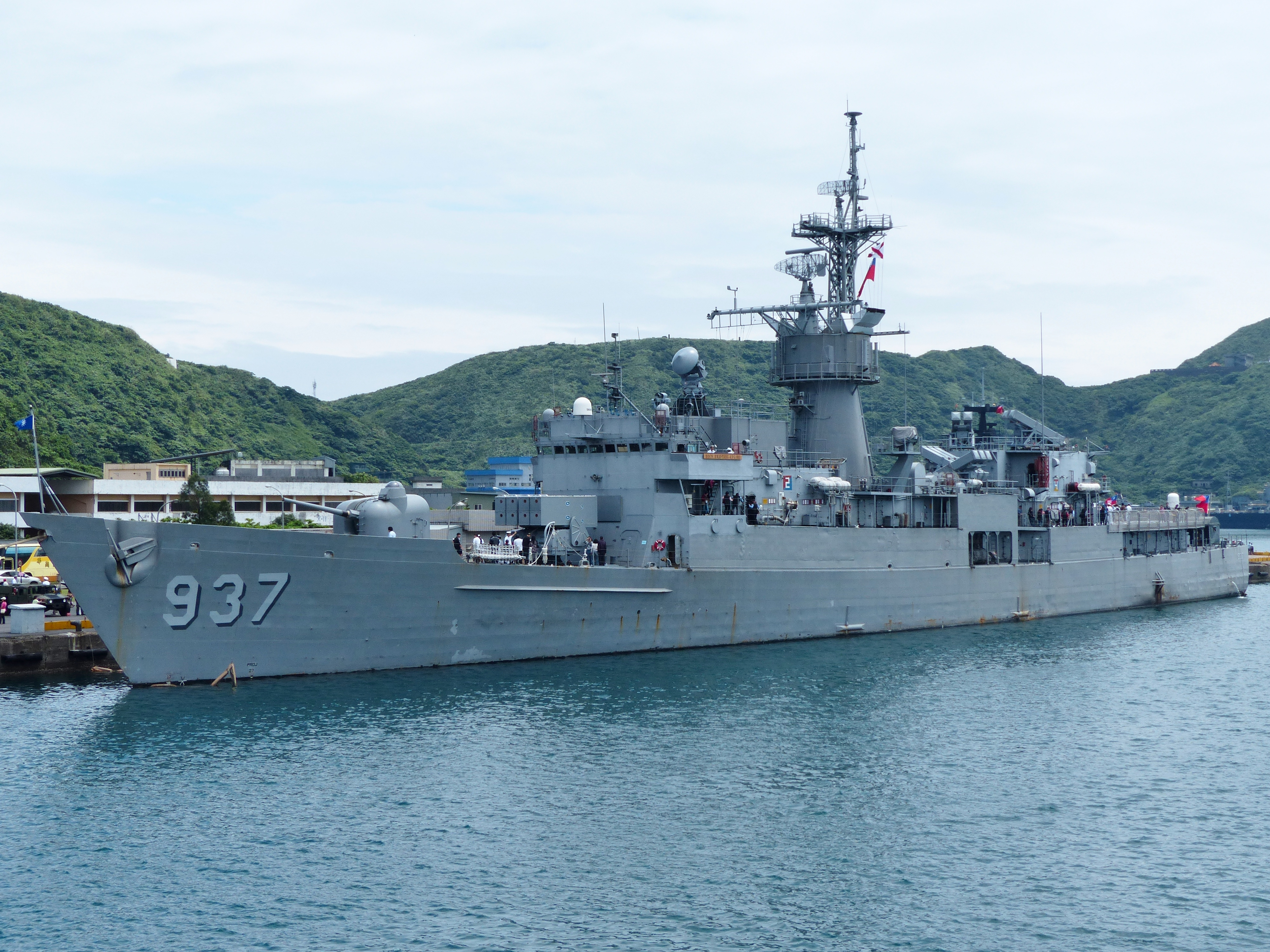 2013年中正軍港營區開放活動，停泊11號碼頭的巡防艦淮陽。